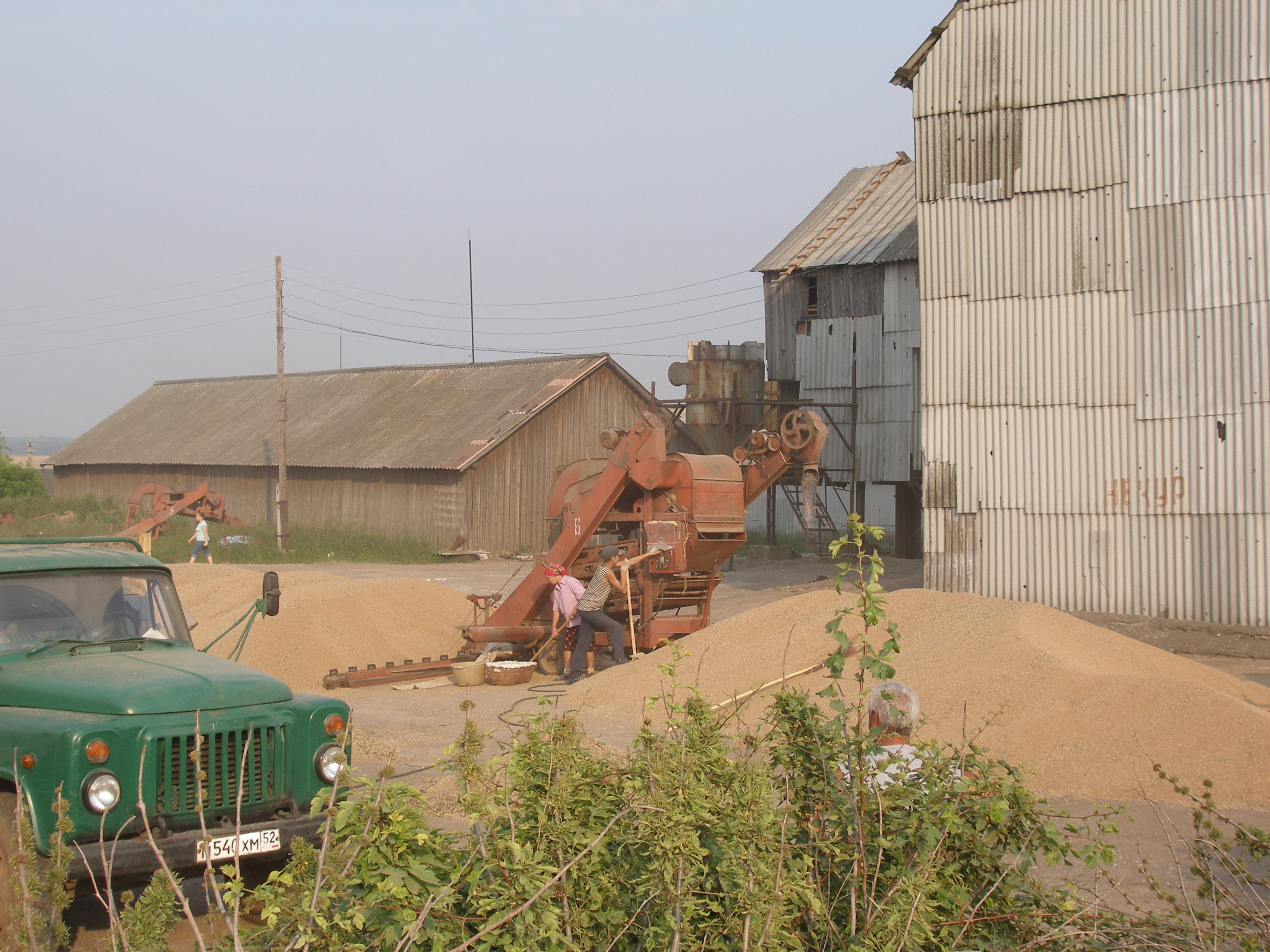 Деревня Малиновка Кстовского района наши дни